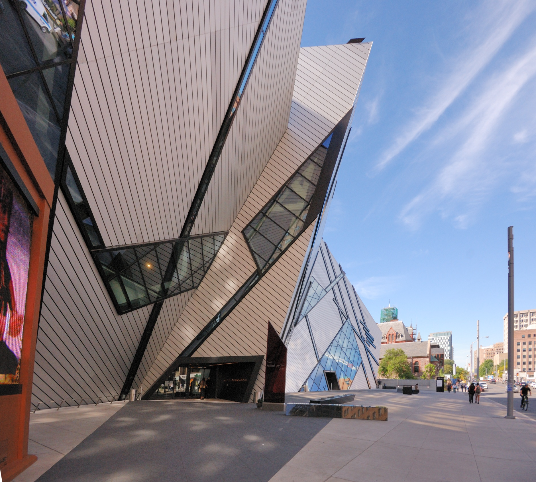 Toronto: Royal Ontario Museum